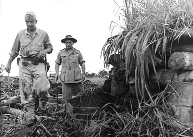 Australian General Thomas Blamey and Lieutenant General Robert Eichelberger, US Army, inspect a bunker at Buna